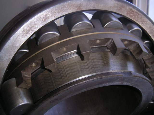 Usure par cannelures sur un roulement